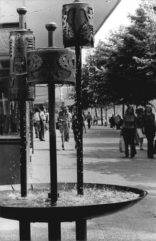 Frankfurt/Oder, Wasserspiele Zum Beitrag: Im Wappen Fleiß und Fruchtbarkeit- Zum 725. Geburtstag der Stadt Frankfurt an der Oder ADN-ZB Sturm-13.6.1978 In der Karl-Marx-Straße im Zentrum der Bezirksstadt Frankfurt an der Oder, die in diesem Sommer ihr 725-Jähriges Jubiläum feiert. Bitte betrachten sie hierzu auch T0613-307N, 309N-312N